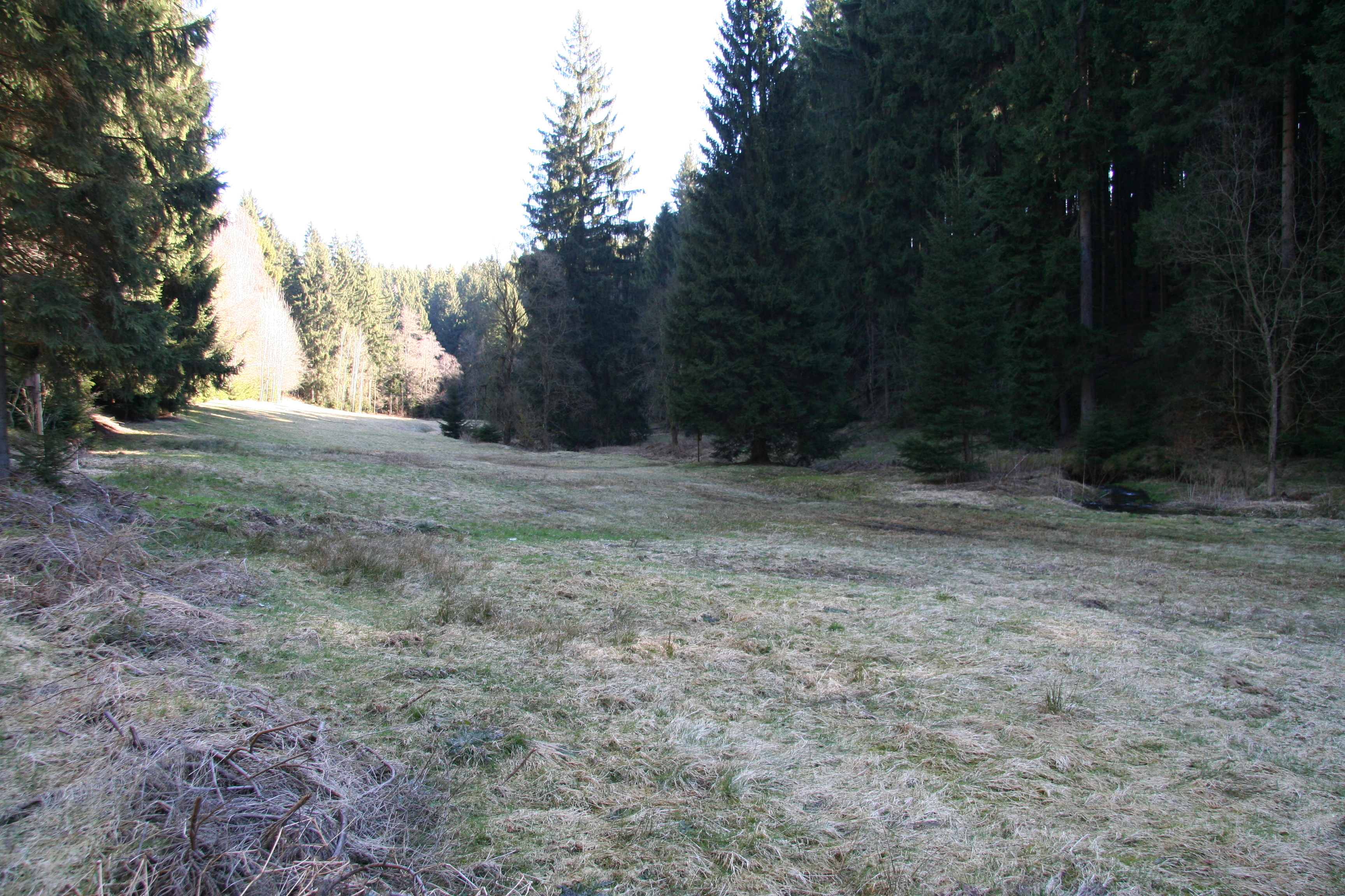 im Naturschutzgebiet "Rauschenbachtal", östlich von Annaberg-Buchholz